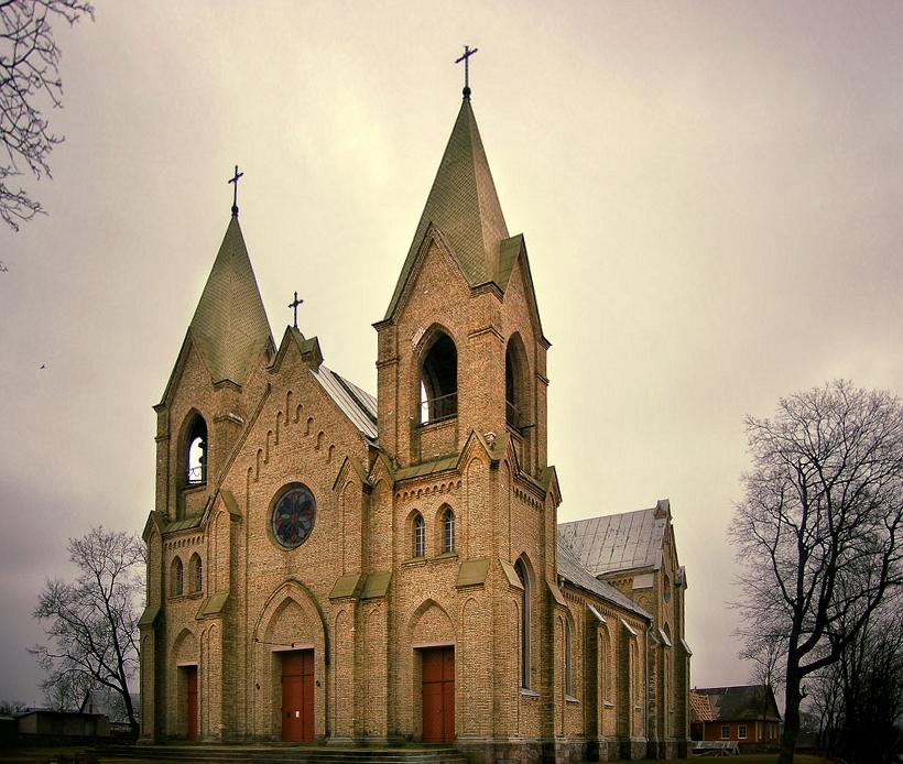 Беларуская (тарашкевіца): Касьцёл Маці Божай Ружанцавай. в. Ракаў This is a photo of Belarusian heritage monument. Reference number: 613Г000096 ( WLM)